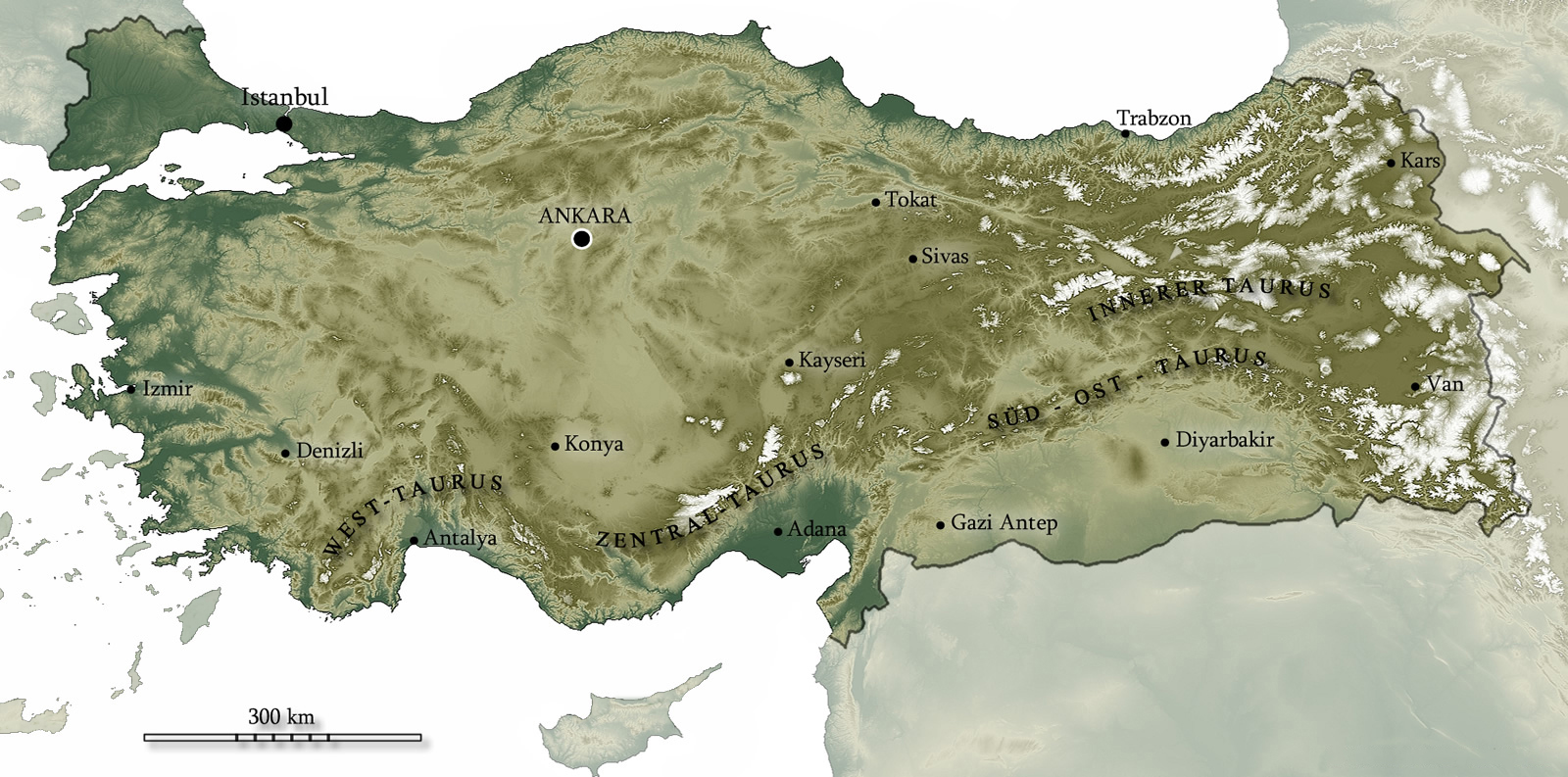 Reliefkarte (SRTM GTOPO30)